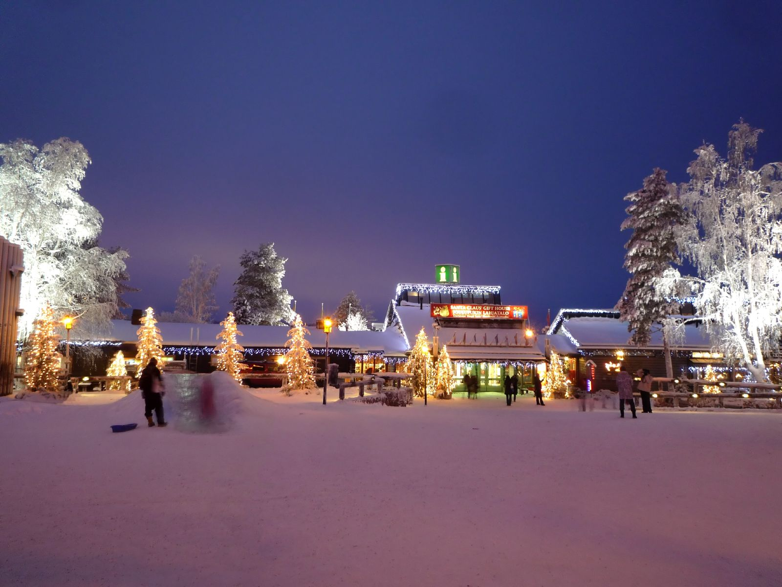 Santa Claus Village in Rovaniemi, Lapland, Finland